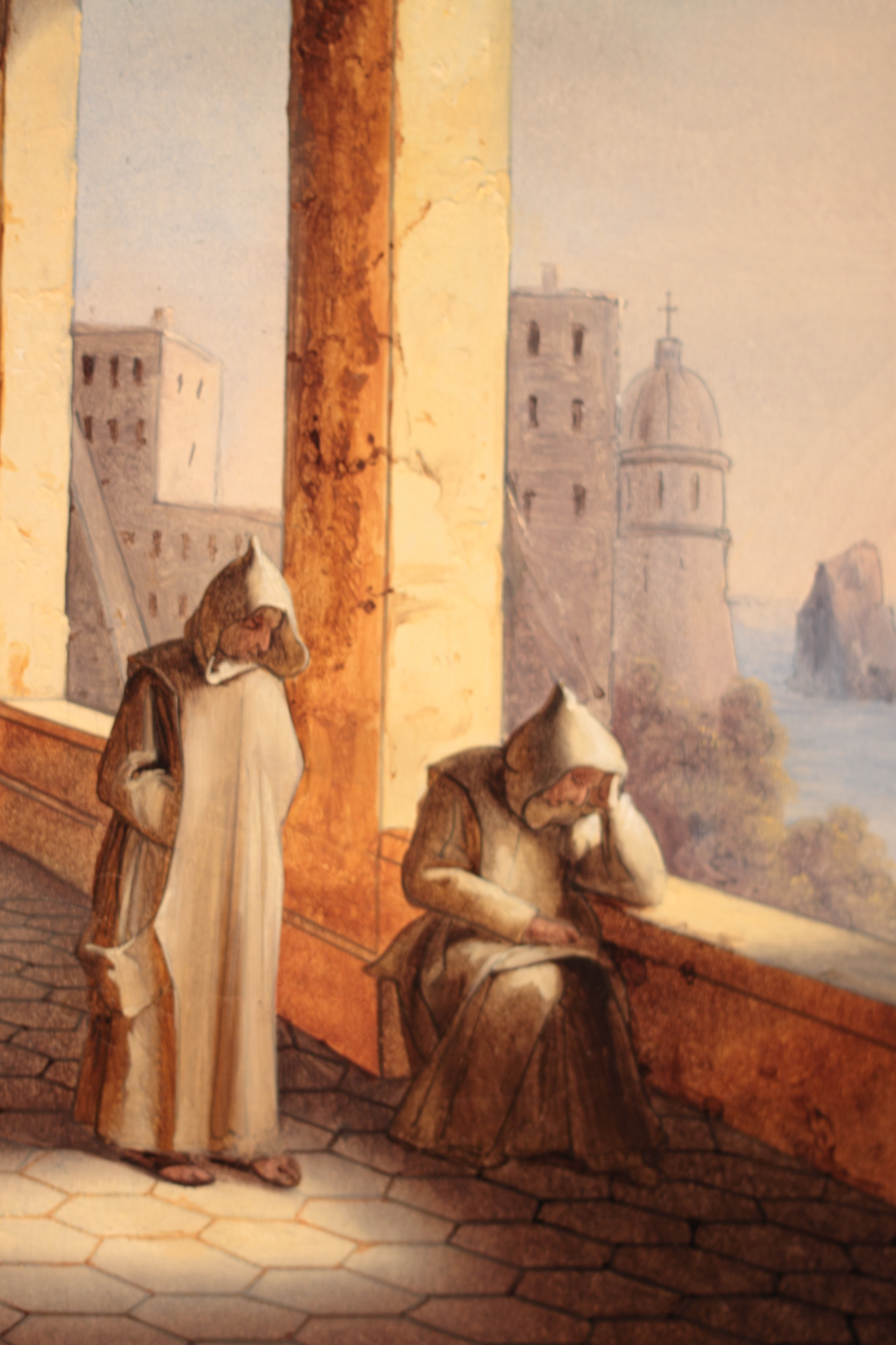 Frères dans la Chartreuse de San Giacomo à Capri